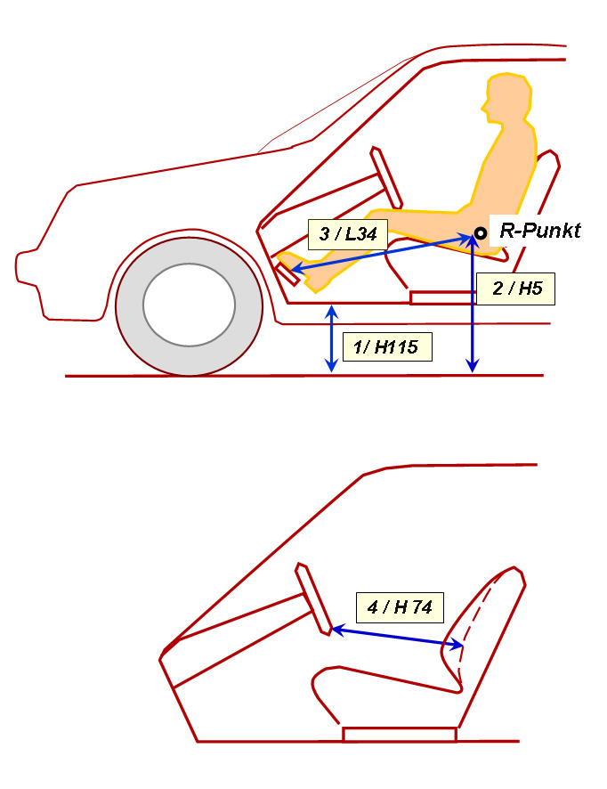 Kraftfahrzeugmaße nach DIN am Fahrersitz